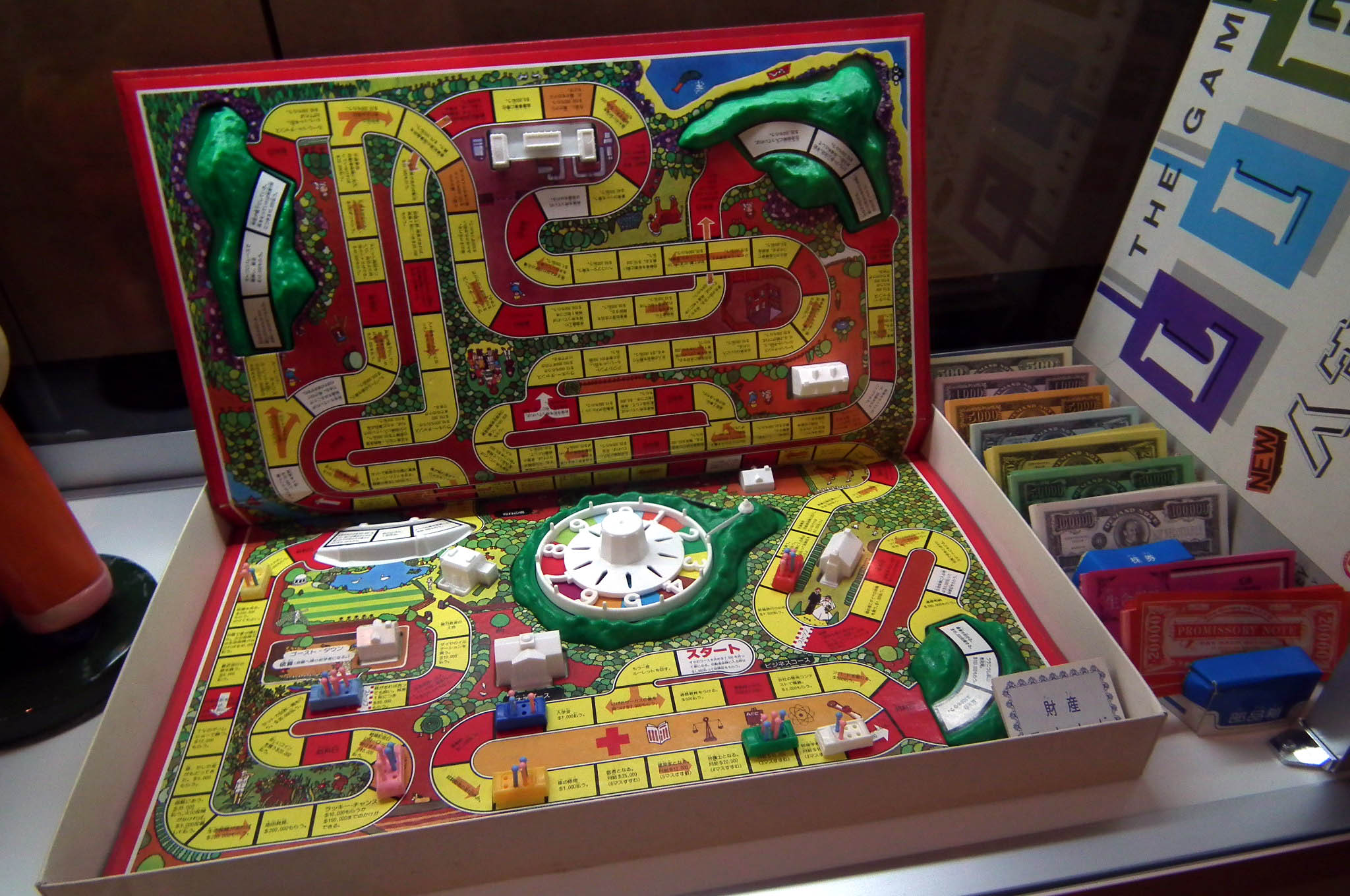 The Game of Life 人生ゲーム